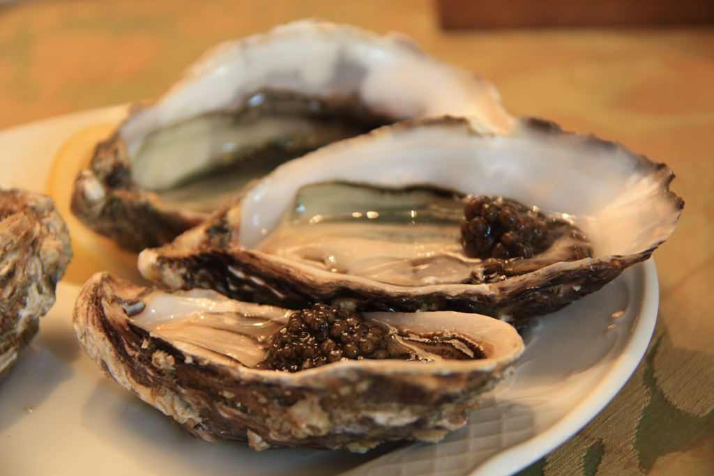 Kaviar in Muscheln